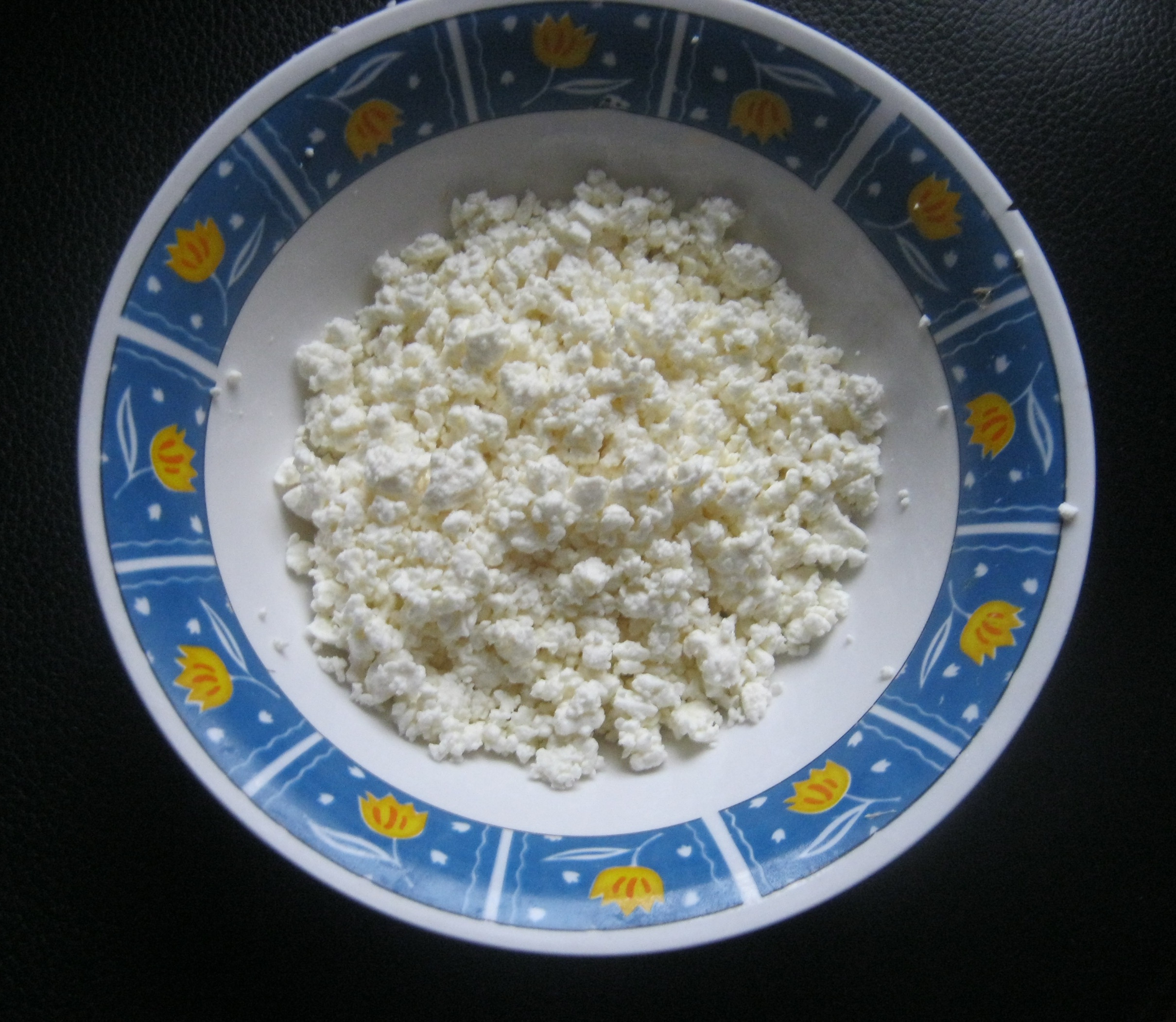 Varškė